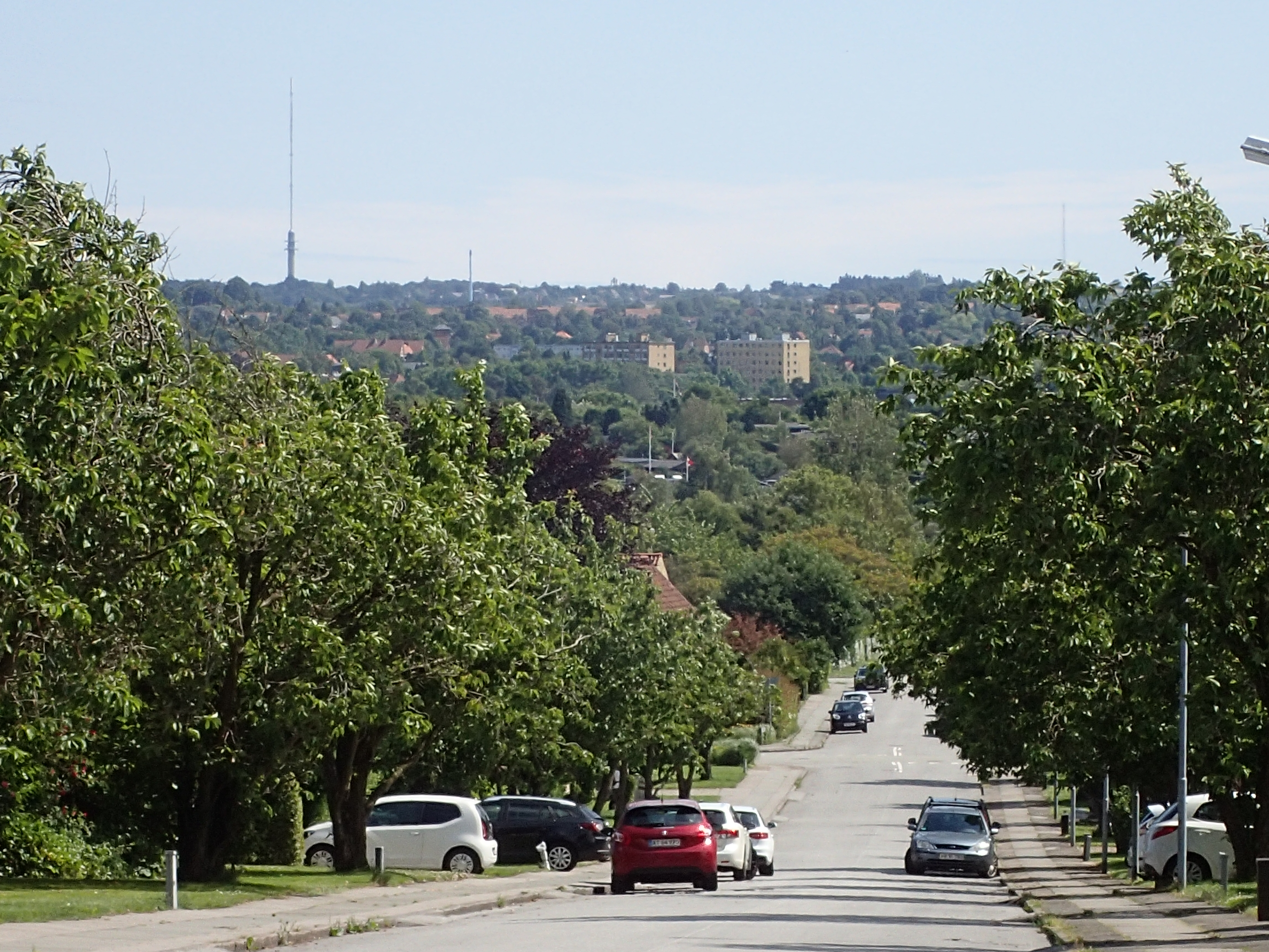 Kresten Kolds Vej med udsyn over Aarhus Ådal i syd.